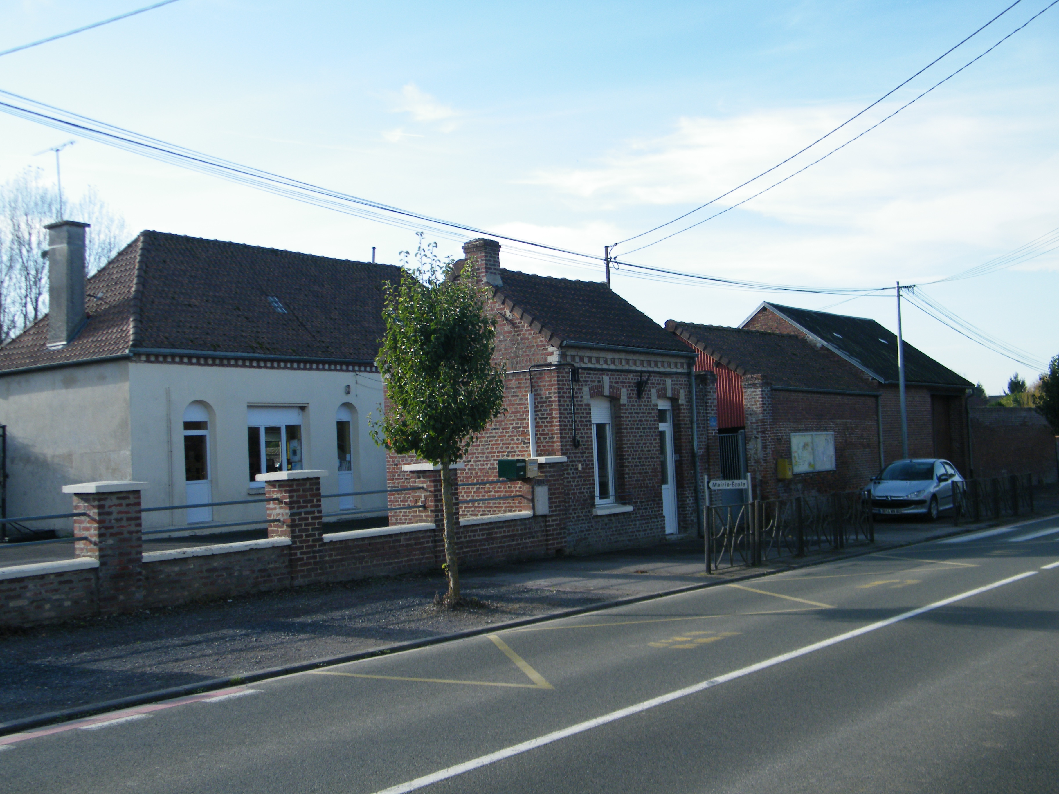 Bâtiments communaux.